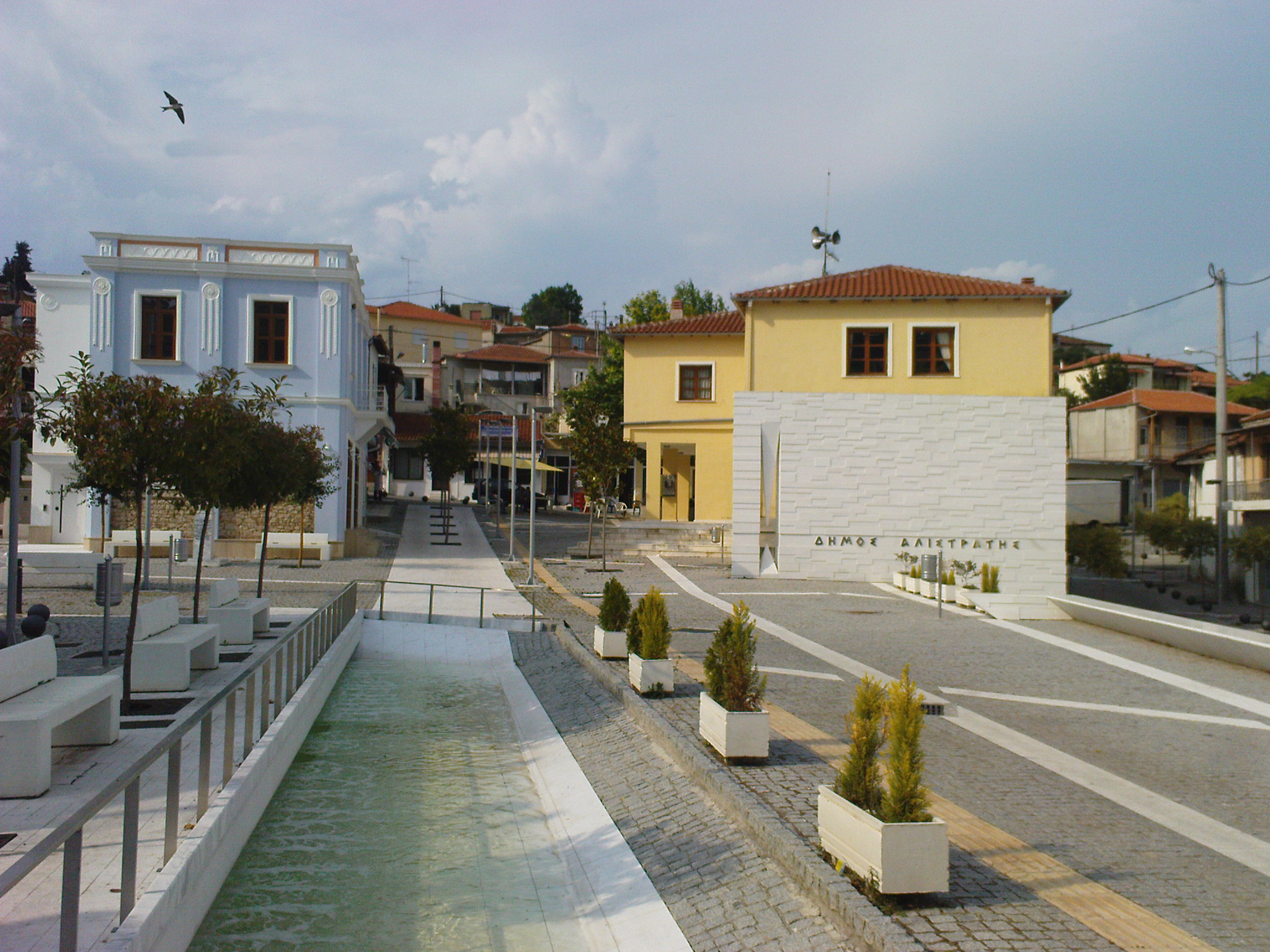 Кметството в Алистрат.